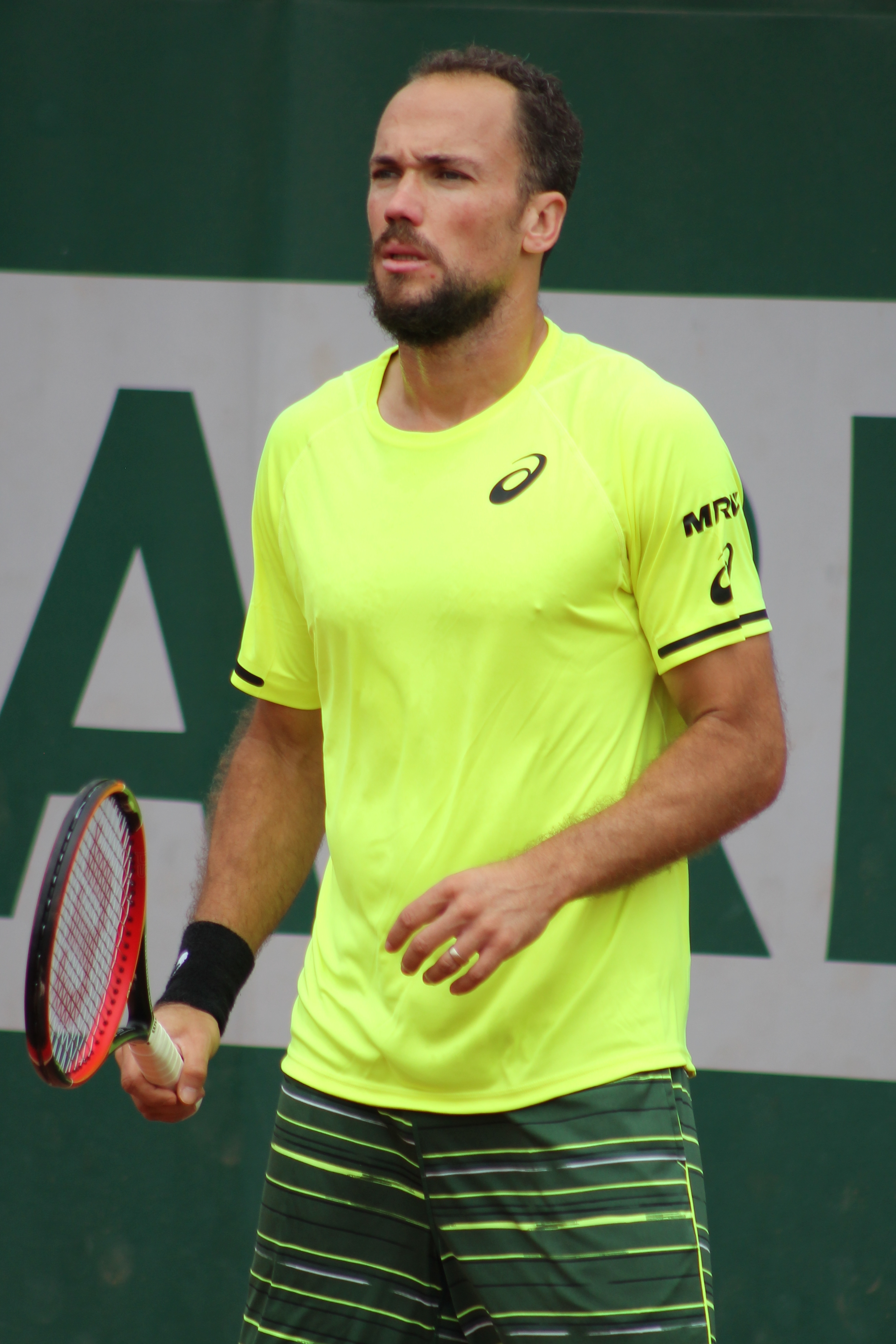 Soares RG15 (2)